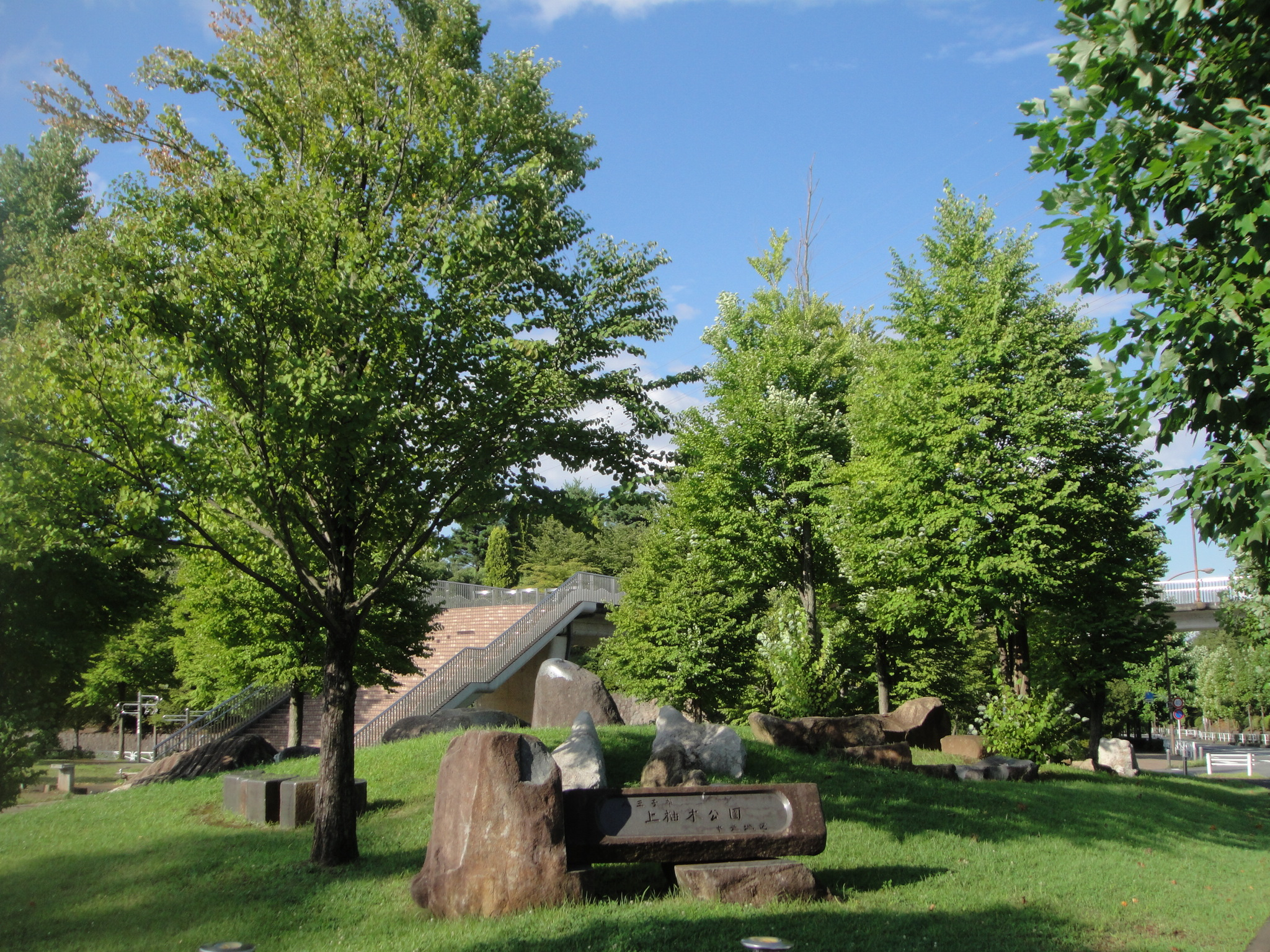 上柚木公園 中央地区